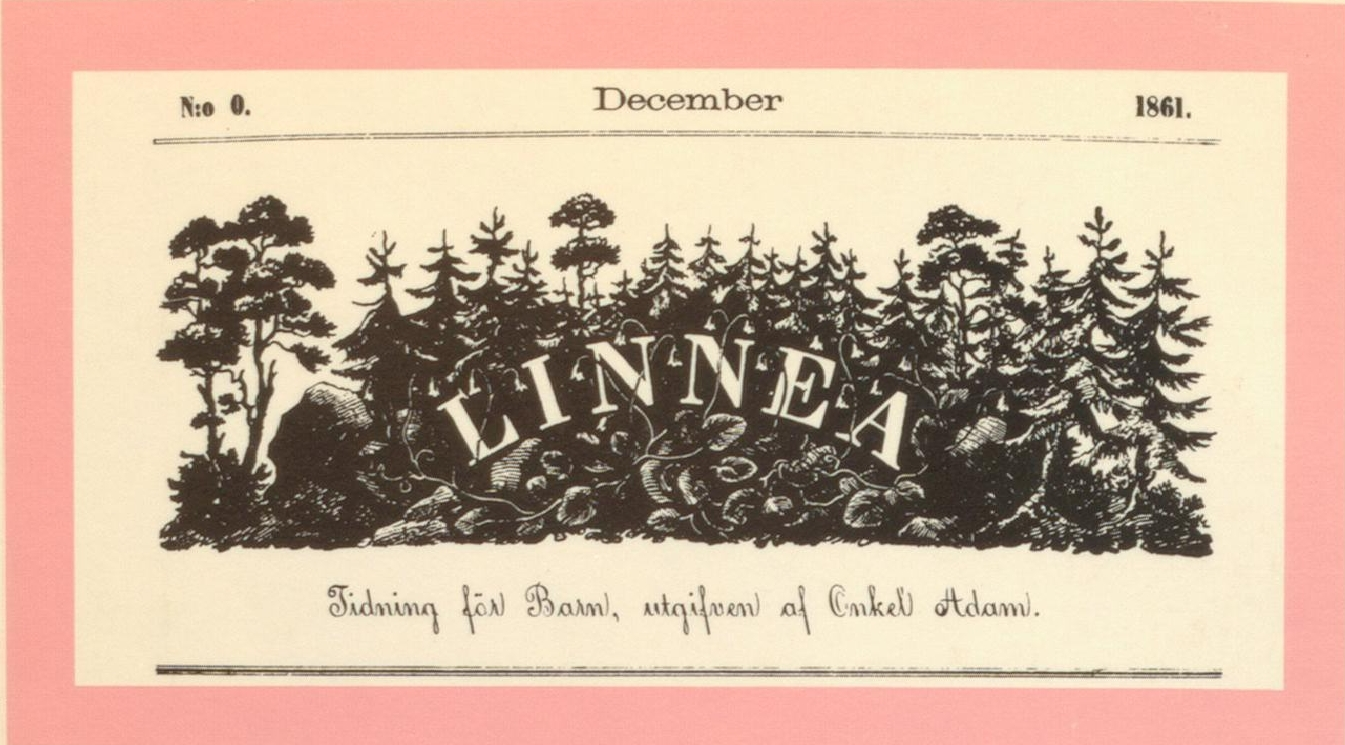 Linnea : Tidning för Barn, Titelvignette der Nullnummer von 1861 mit einem Moosglöckchenfeld im Nadelwald. Die schwedische Kinderzeitschrift erschien 1862–1876 im Verlag des schwedischen Schriftstellers Carl Anton Wetterbergh.